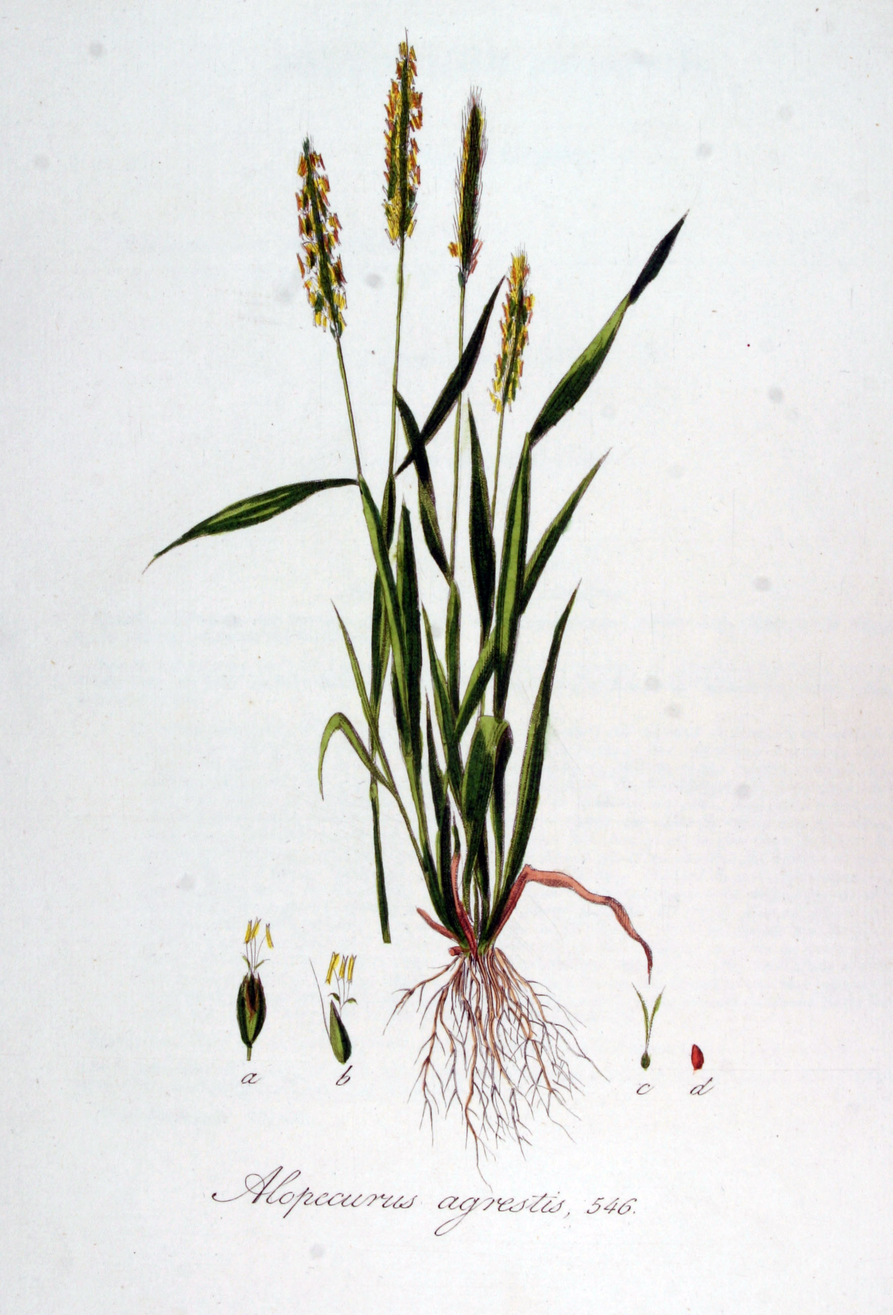 Alopecurus myosuroides Huds. (Syn. Alopecurus agrestis L.)